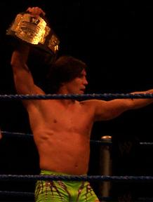 Paul London como Campeon Crucero de la WWE